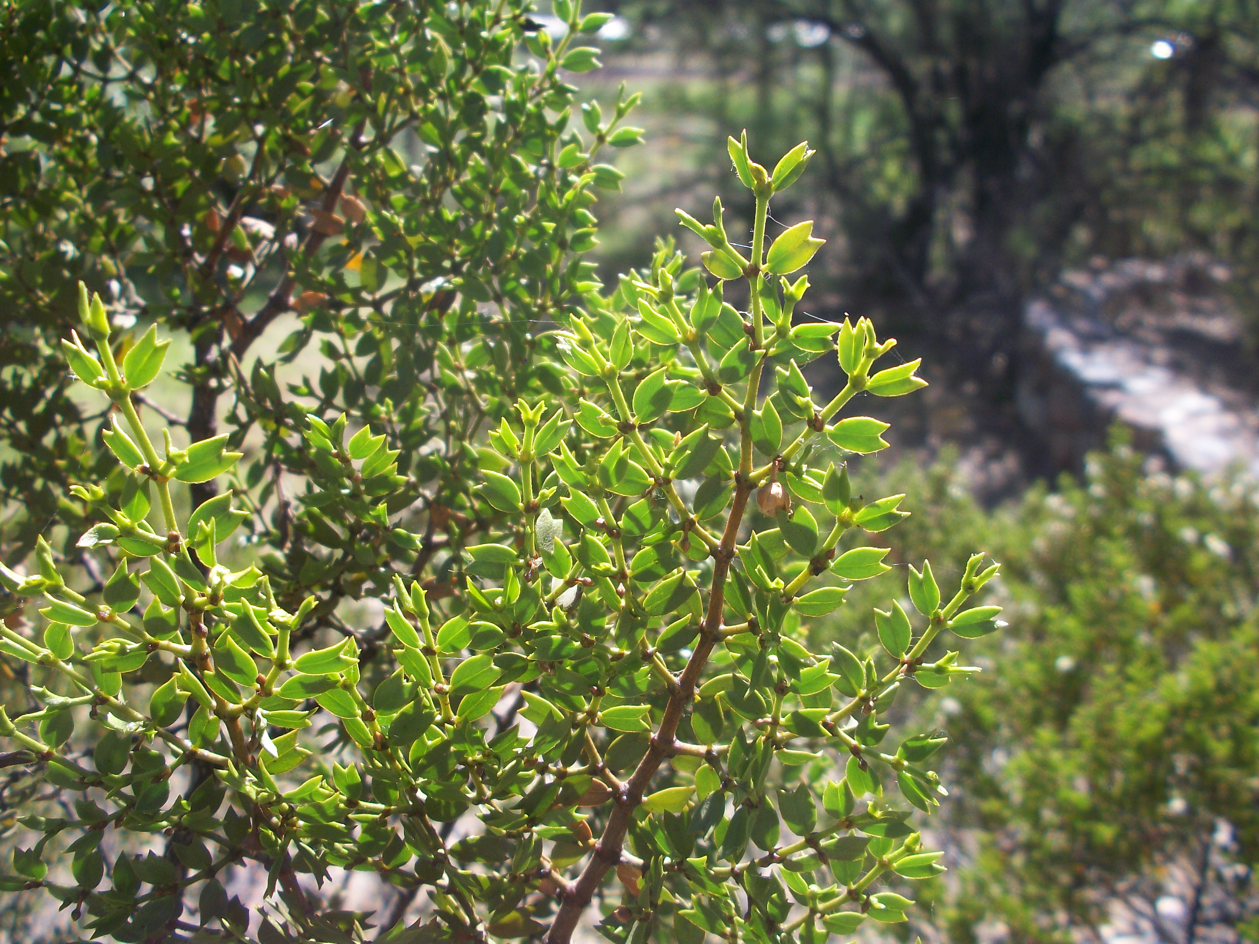 Detalle de rama y hojas de Larrea cuneifolia, en Mendoza, Argentina.